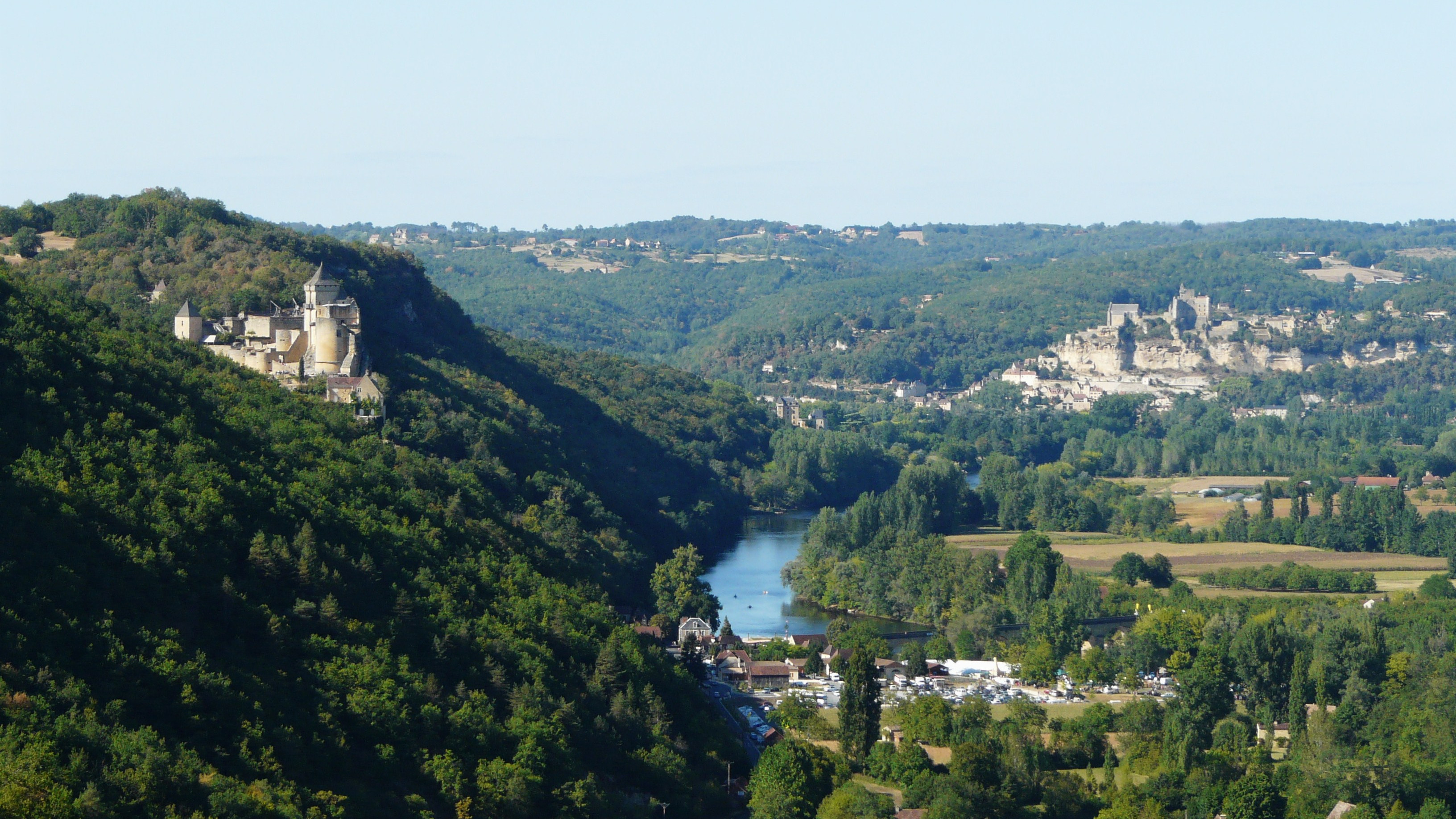 La vallée de la Dordogne avec le château de Castelnaud (à gauche) et le château de Beynac (à droite), Dordogne, France. Vue prise depuis le parc du château de Lacoste.